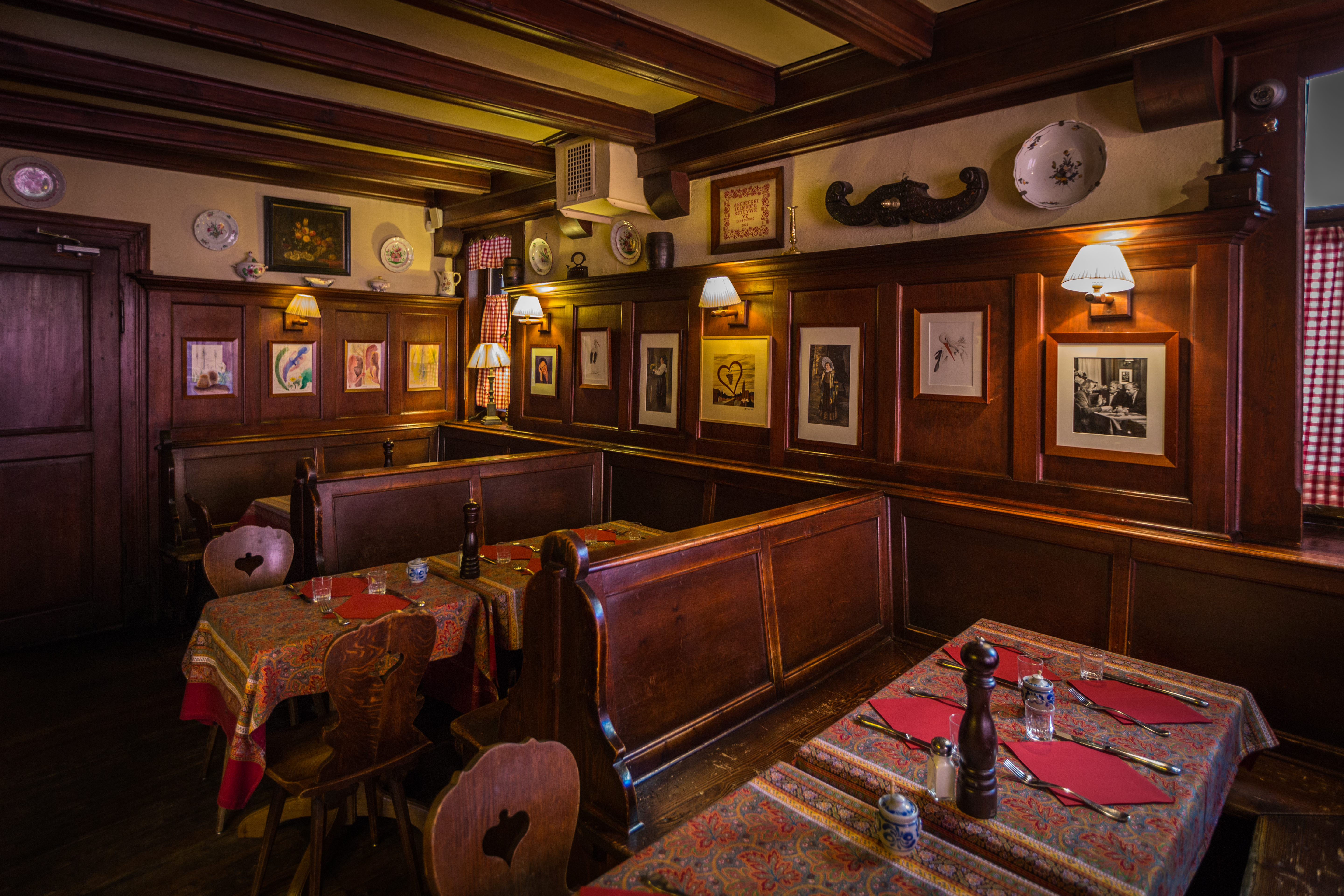 Winstub Chez Yvonne avril 2014